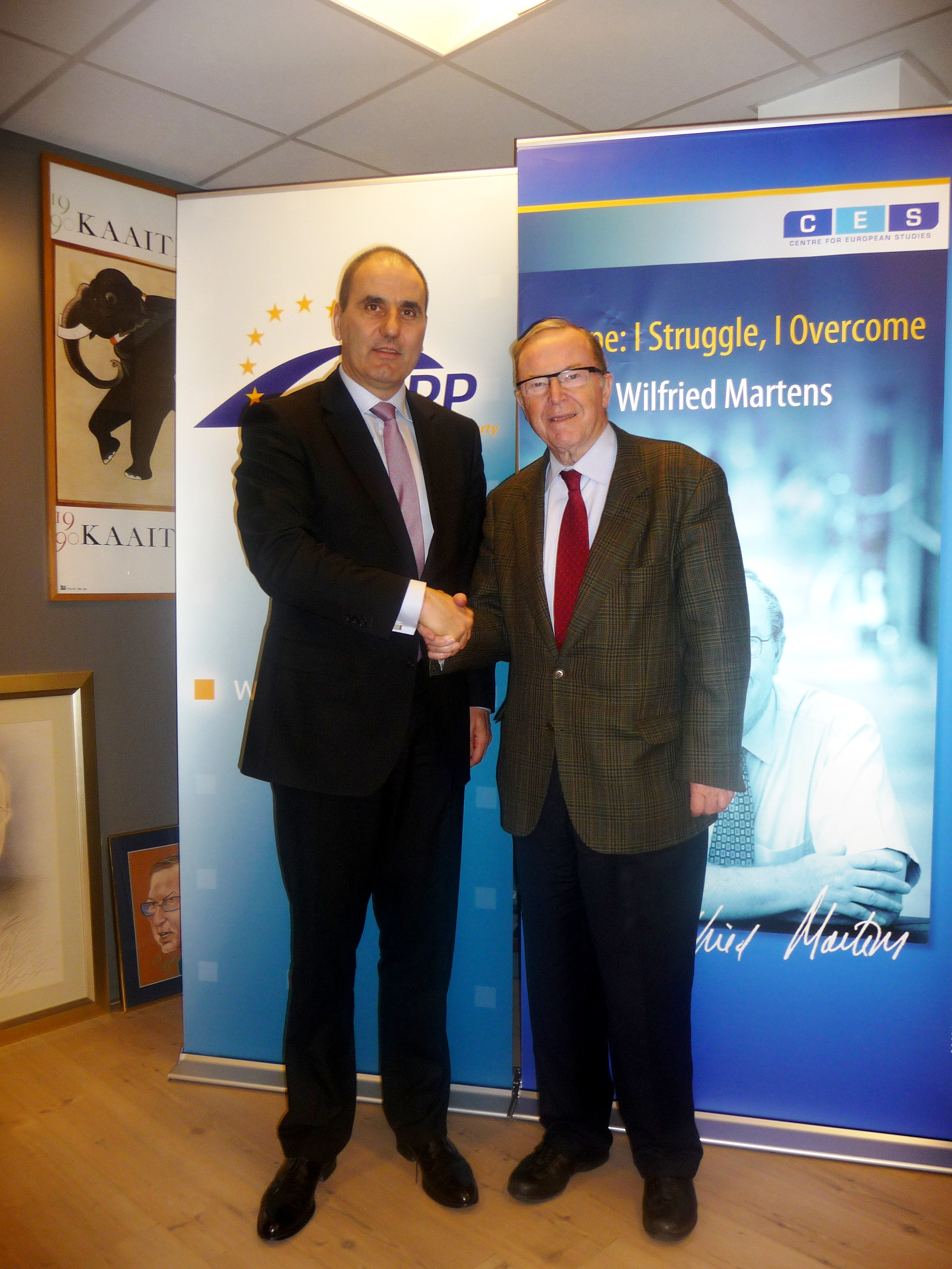 Tzvetan Tzvetanov (l), Wilfried Martens (r)